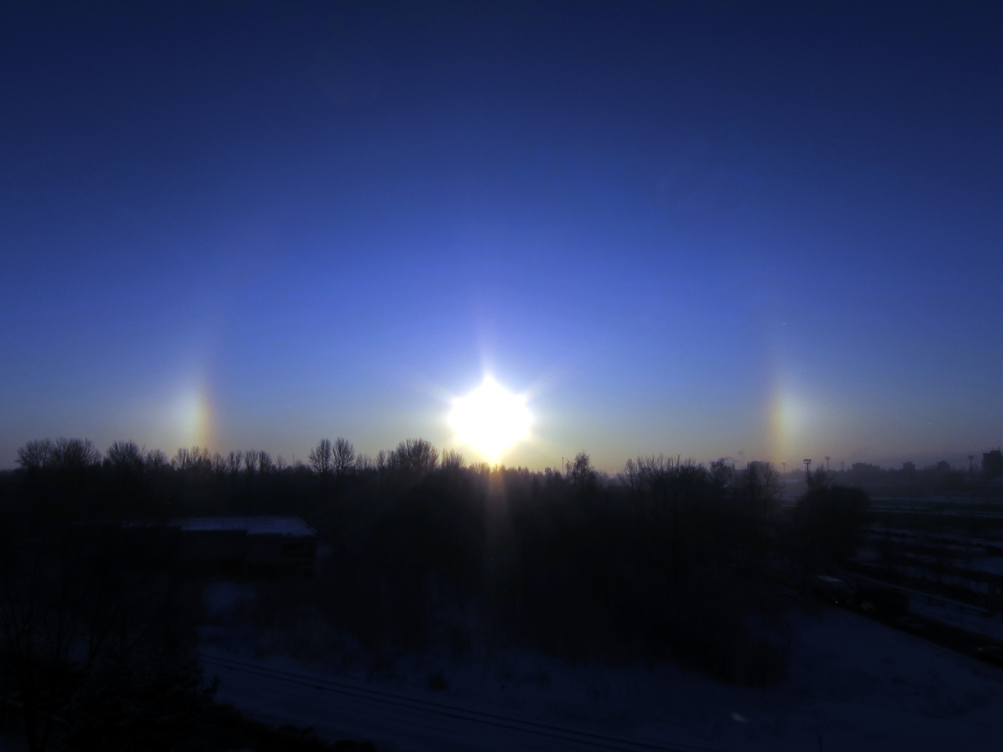 Halo ar parhēlijiem jeb "Saules suņiem" Rīgā, 2016. gada 8. janvārī.